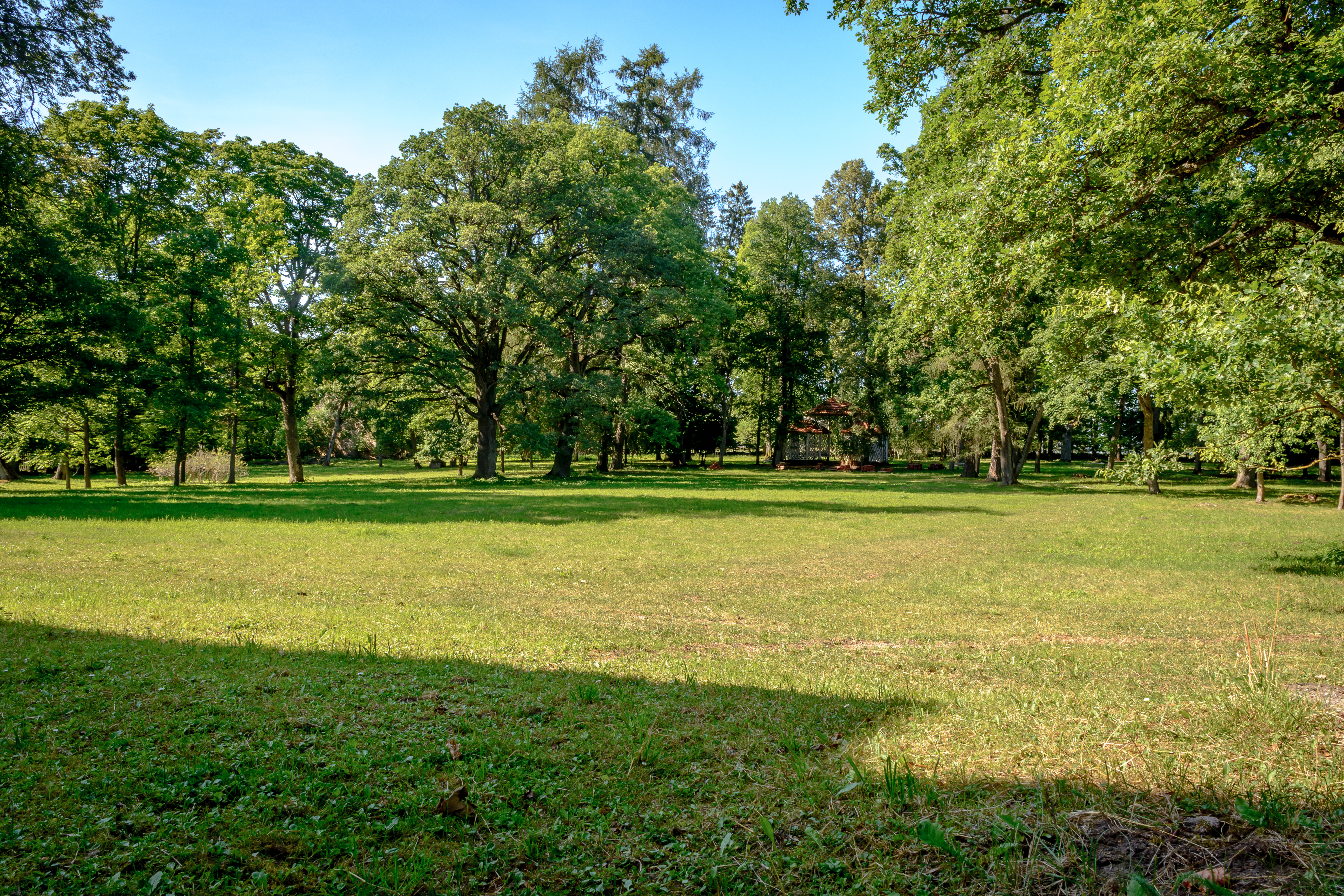 Rägavere mõisa park